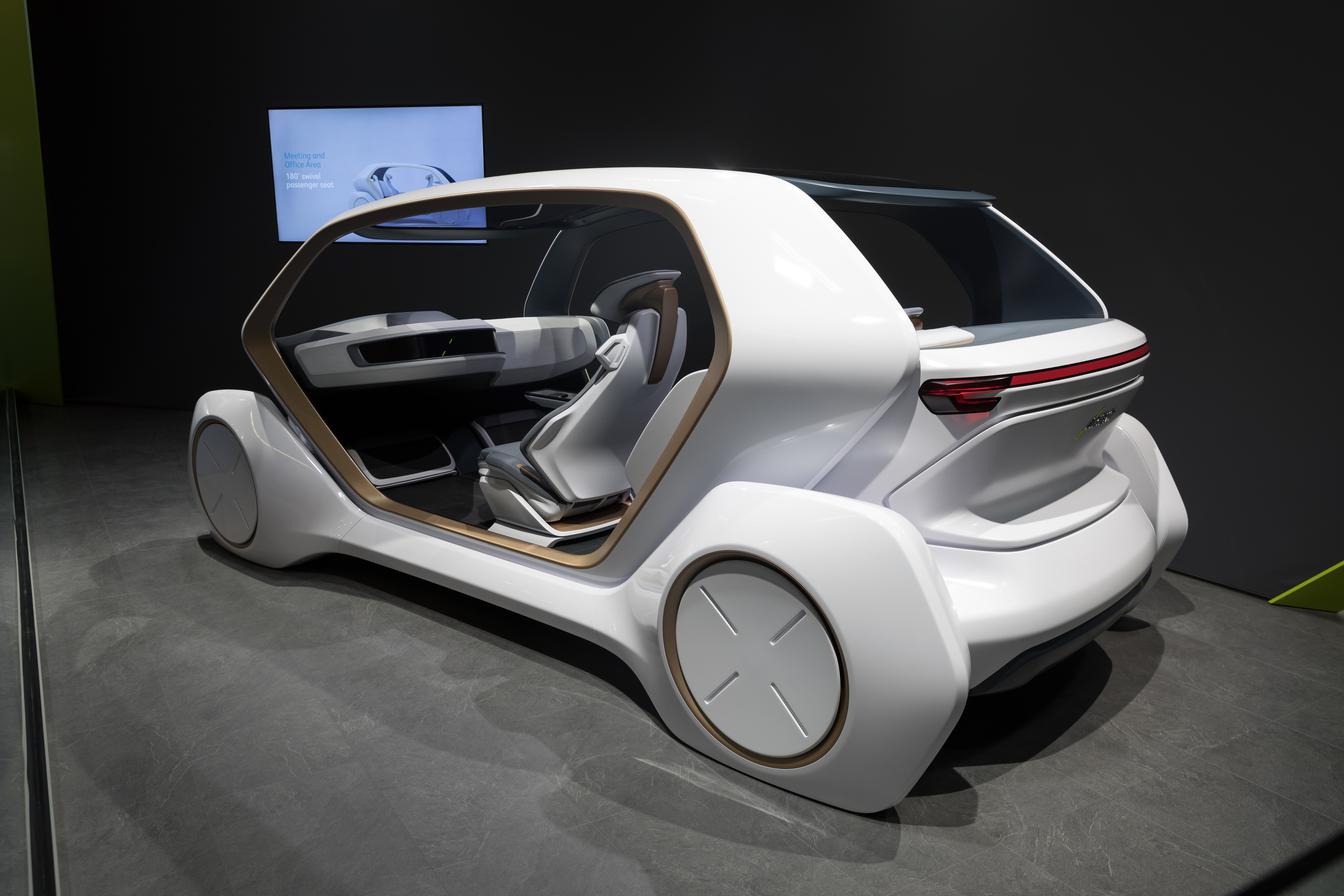 Adient AI18